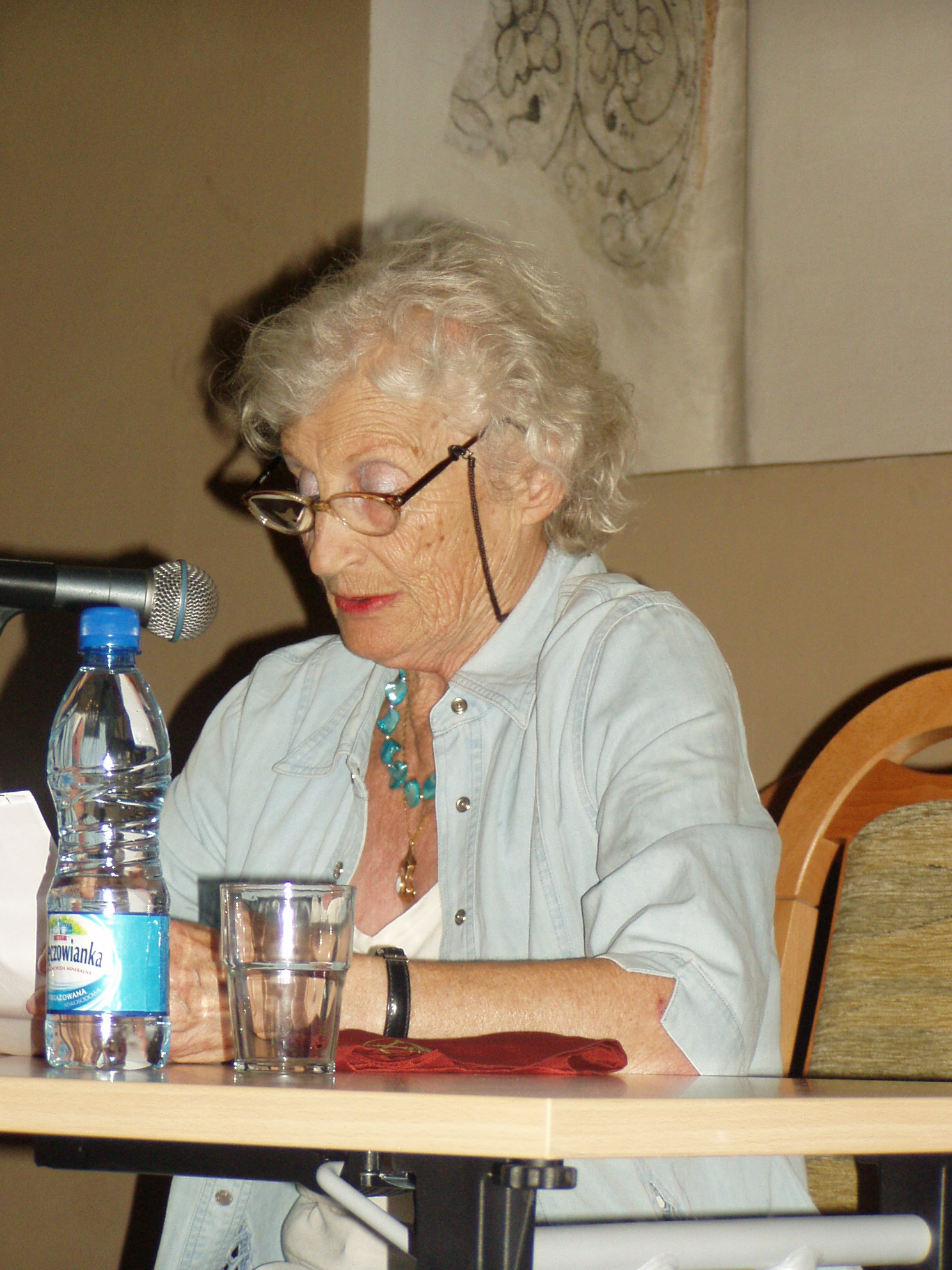 Miriam Akavia na wykładzie w synagodze Kupa podczas Festiwalu Kultury Żydowskiej w Krakowie